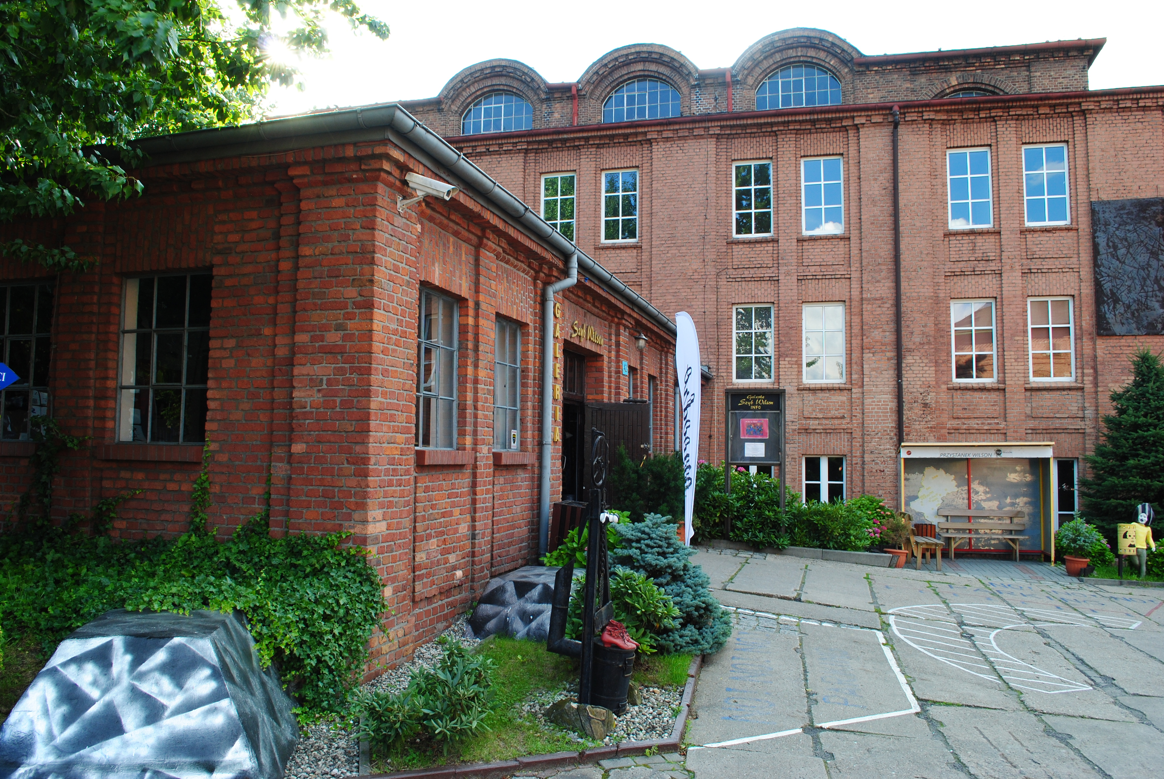 Katowice - Janów-Nikiszowiec. Galeria Szyb Wilson